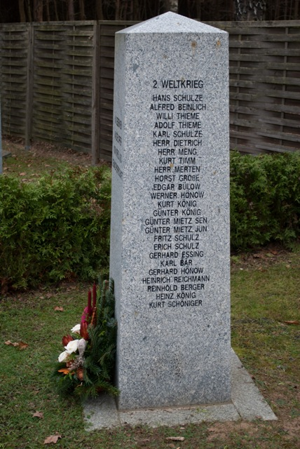 Gedenkstein Mönchwinkel